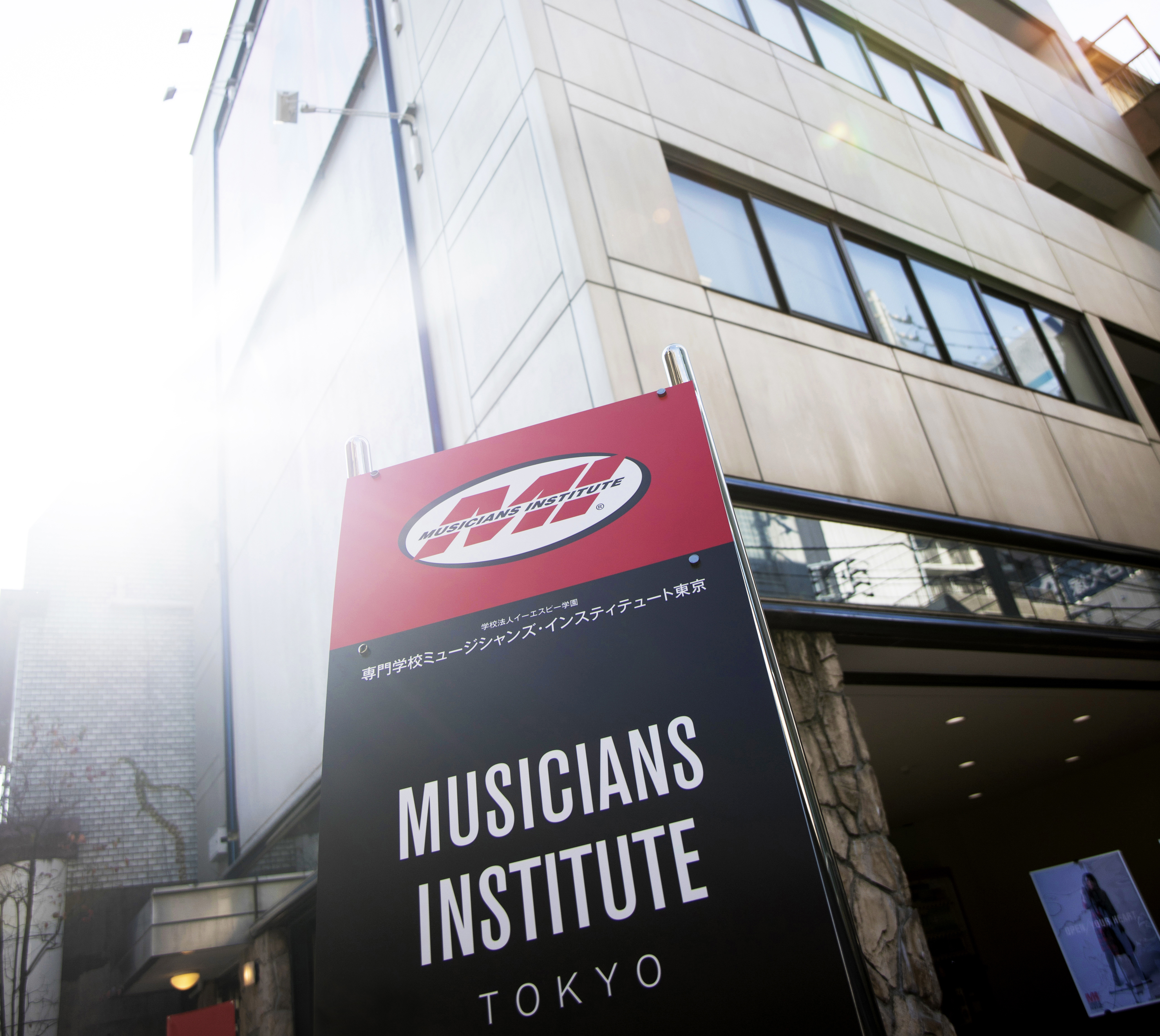 専門学校ミュージシャンズ・インスティテュート東京本館の外観です。